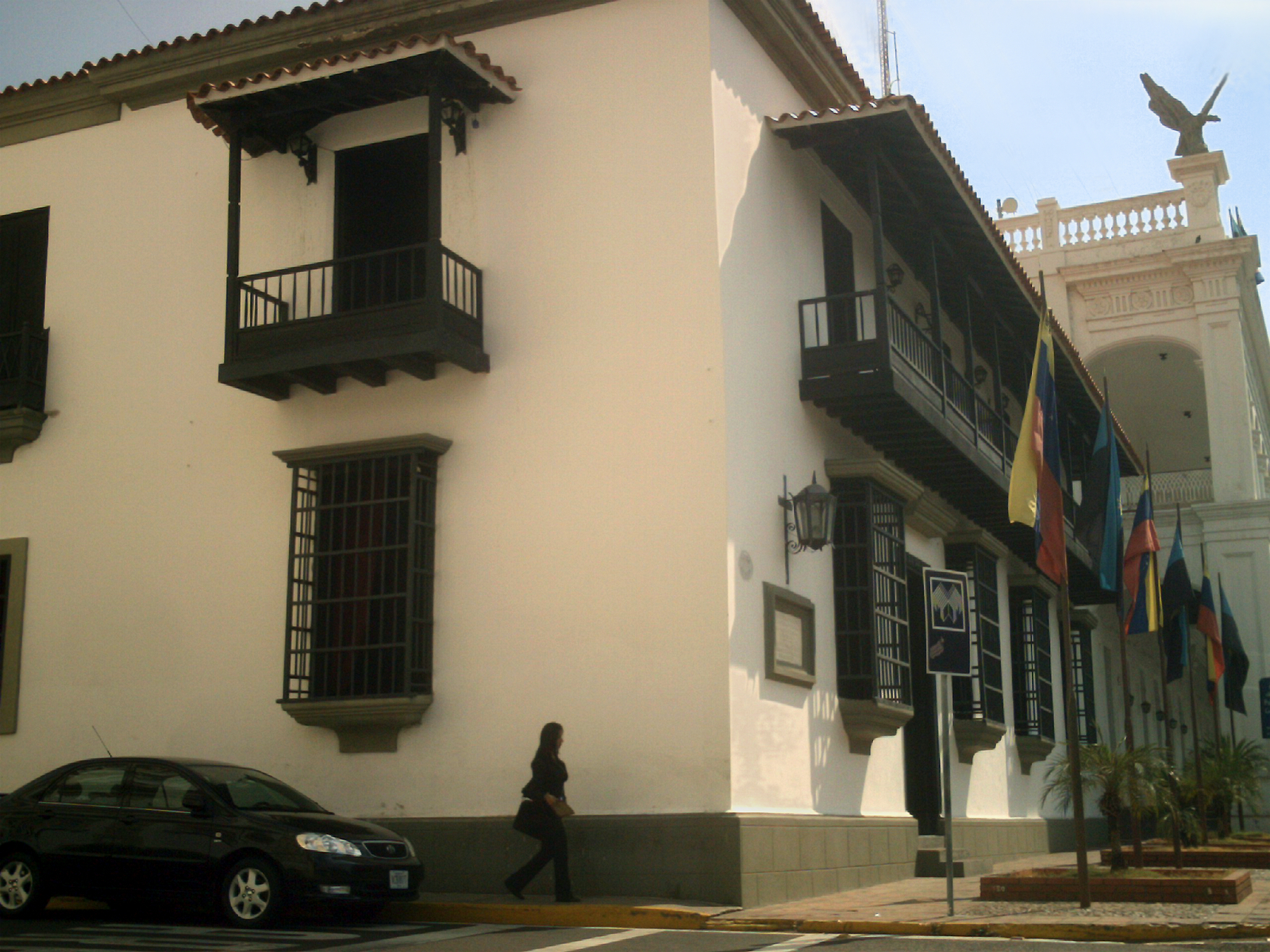 Casa de Gobierno de Maracaibo, frente a la Plaza Bolívar, Estado Zulia, Venezuela